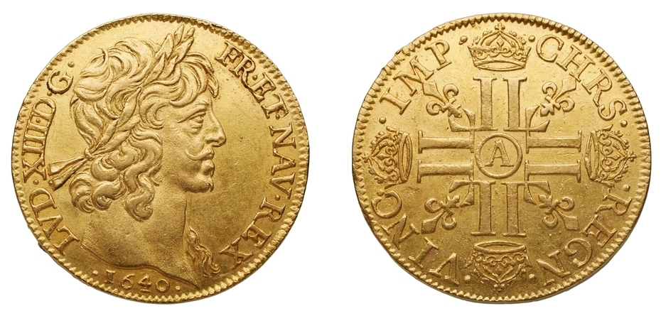 Double louis d'or de Louis XIII, Paris, 1640, collections historiques de la Monnaie de Paris. Ref : MON C 000867